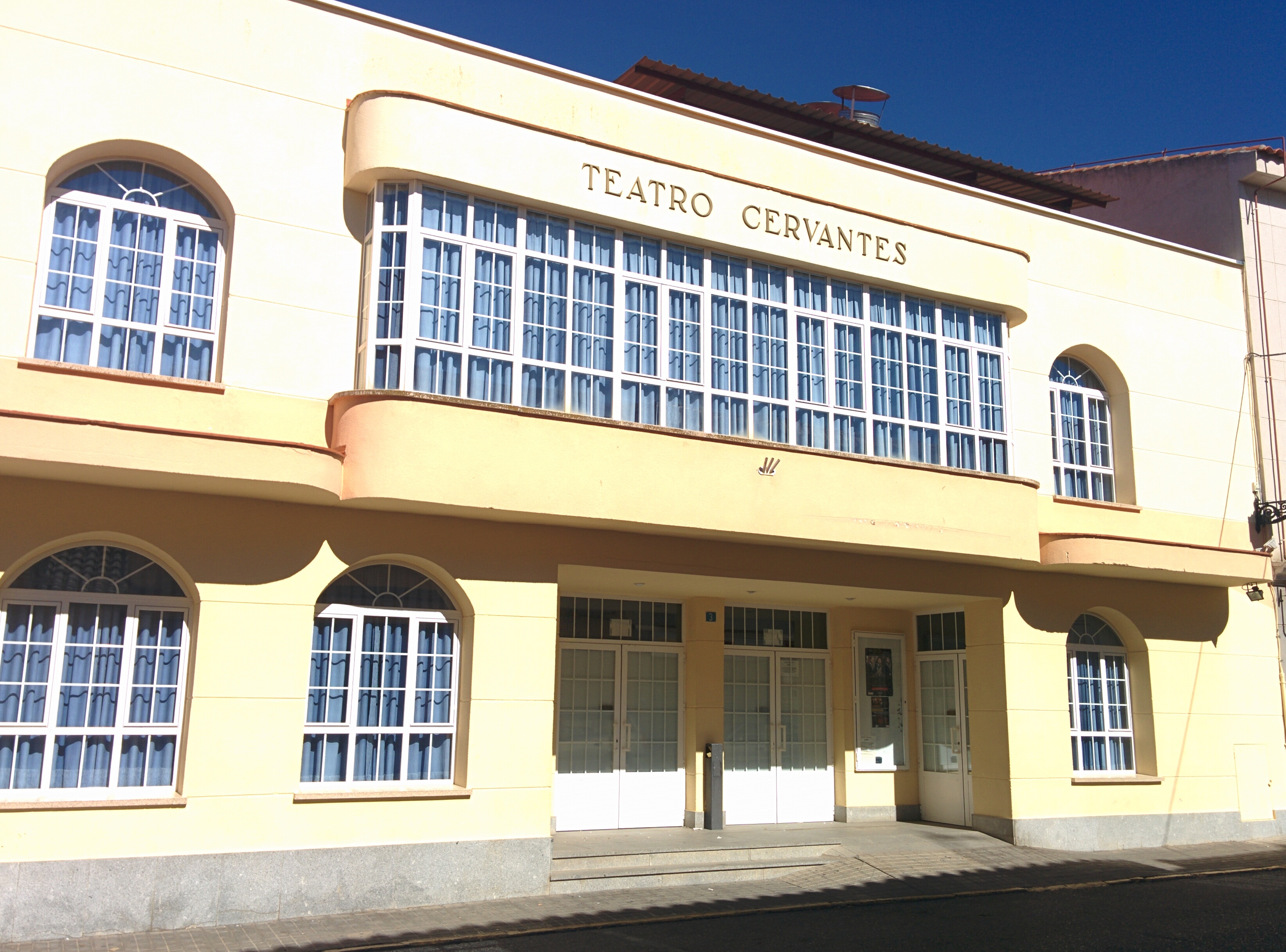 Teatro Cervantes, en Sonseca (Toledo, España).